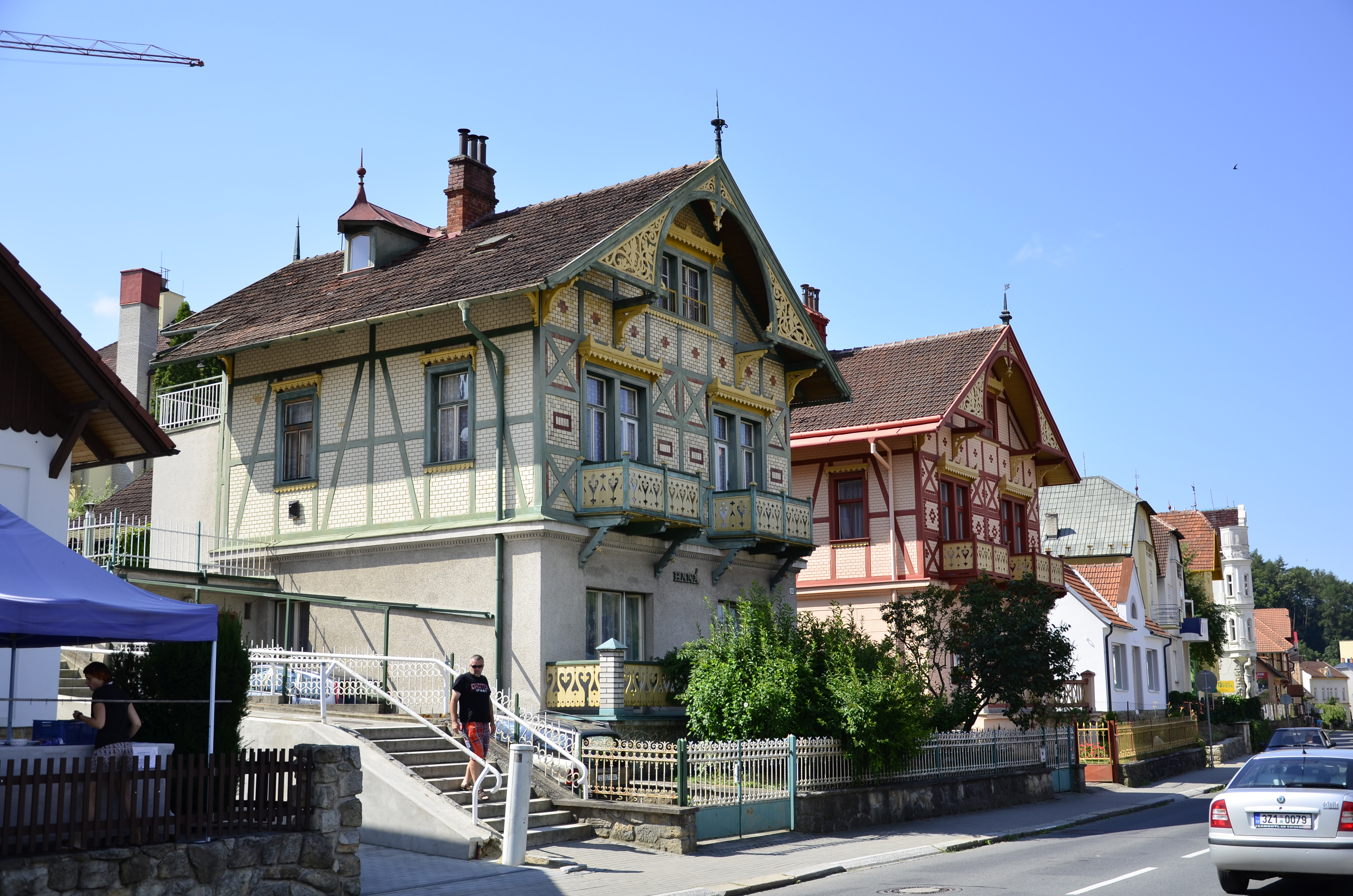 Vila Haná (Luhačovice), Masarykova 209, Luhačovice